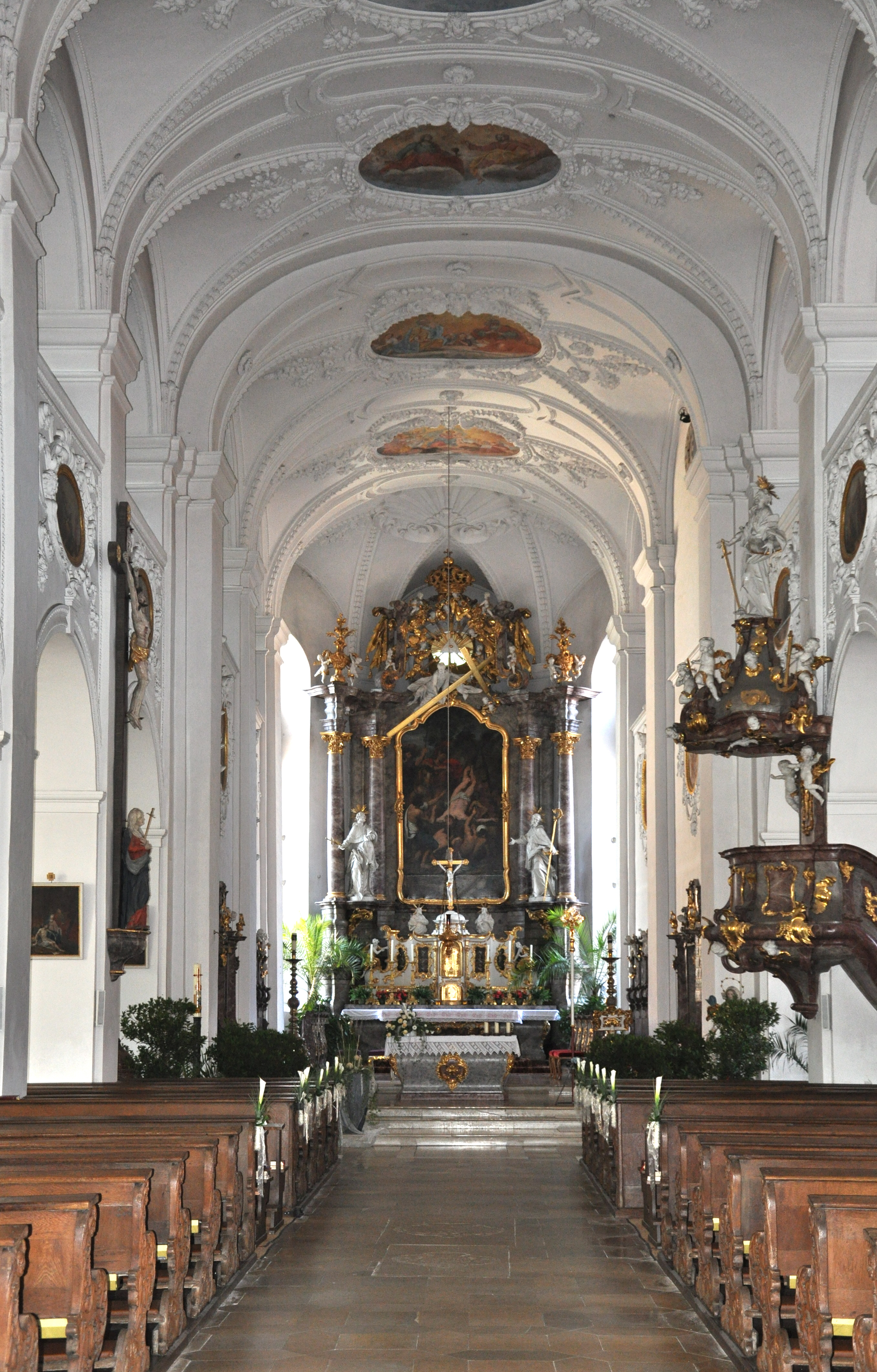 Neuburg an der Donau, Pfarrkirche St. Peter, Innenansicht